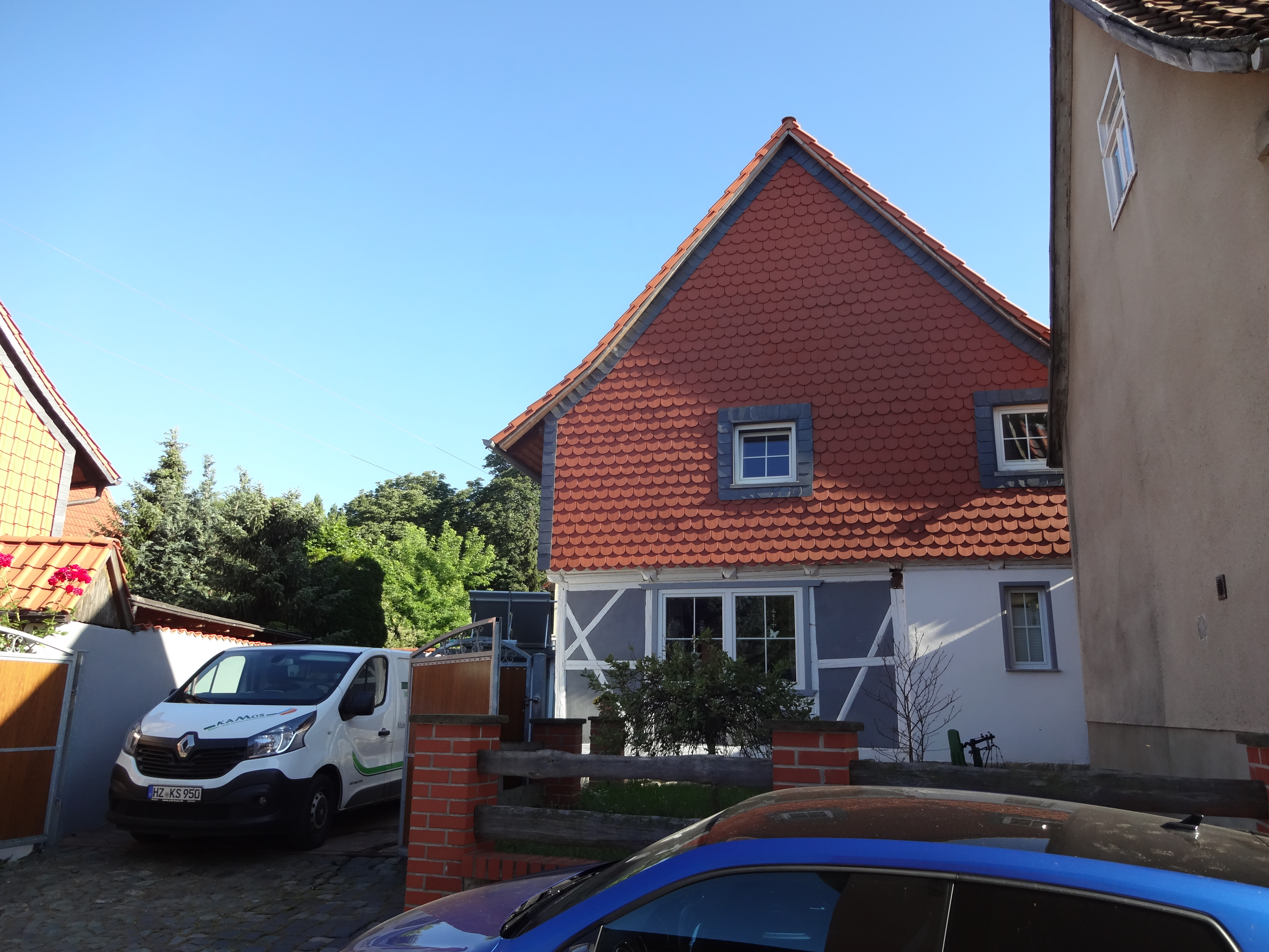 denkmalgeschütztes Wohnhaus in der Glockenstraße 10 in Harsleben